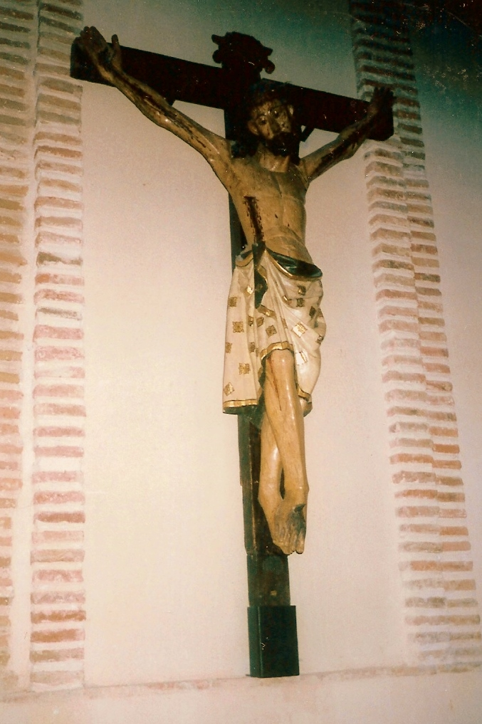 Cristo gótico de San Gil en la iglesia de San Andrés de Cuellar